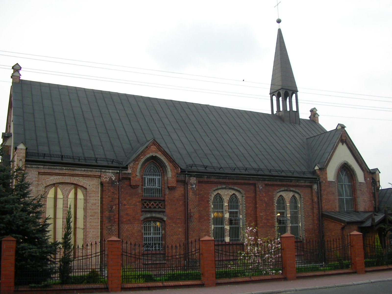 Kościół rzymskokatolicki w Brzezince (Mysłowice)